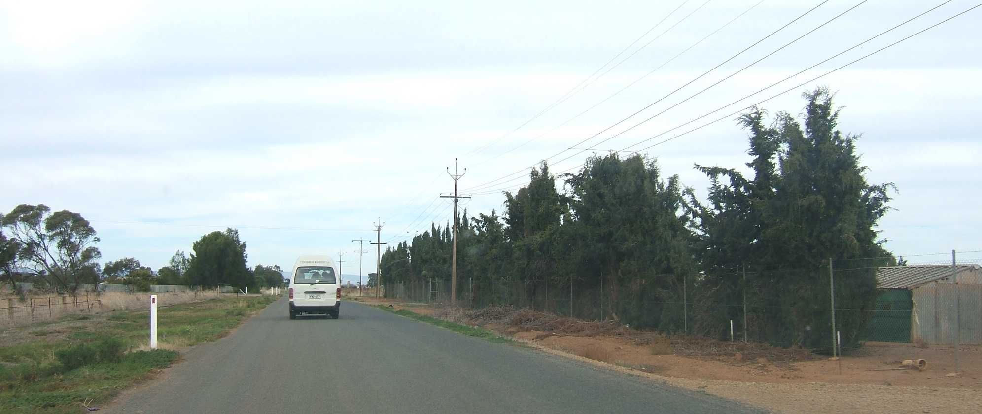 Buckland Park, Adelaide